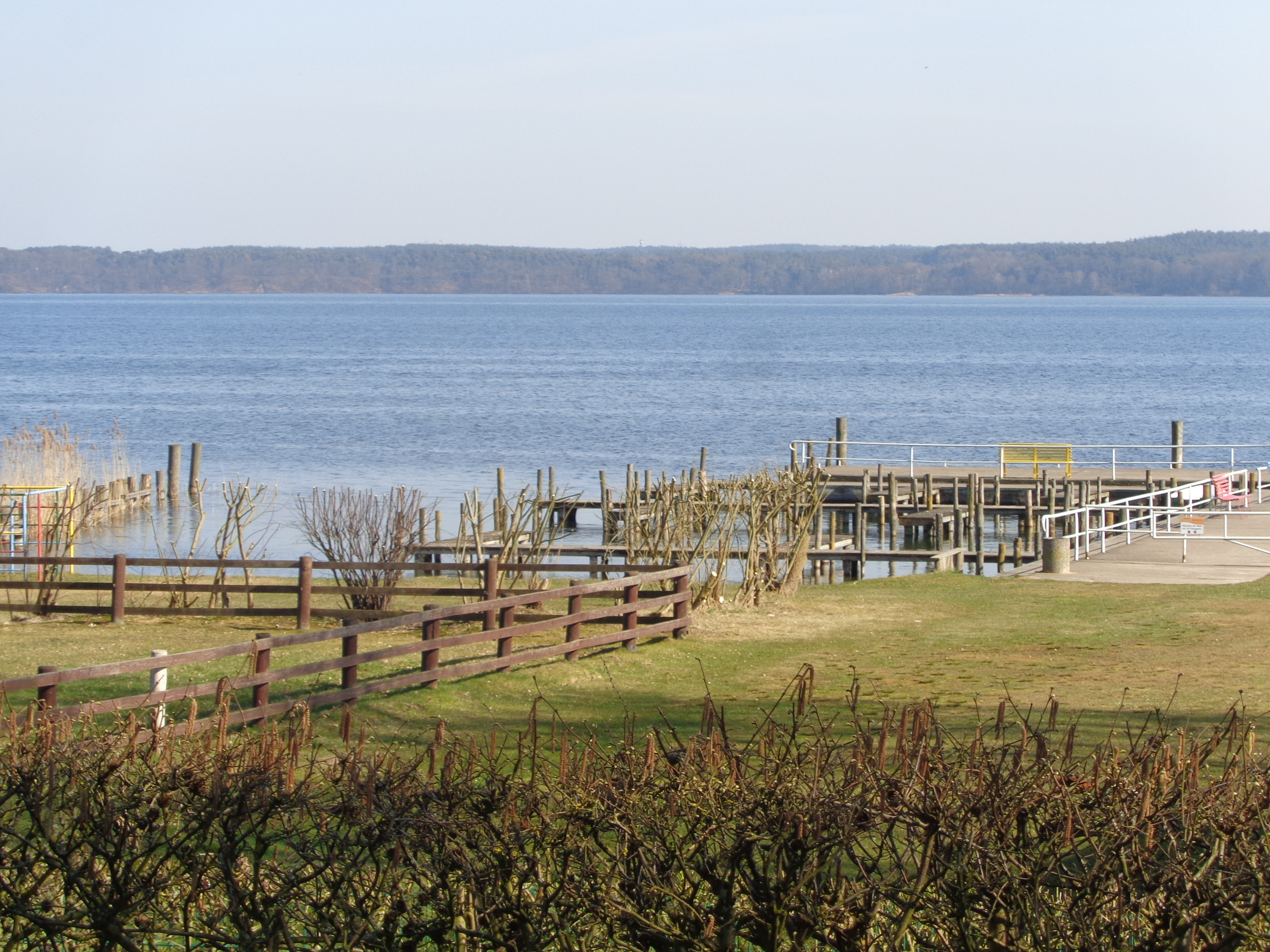 Bootsstege am Plauer See, Heidenholz, Plau am See